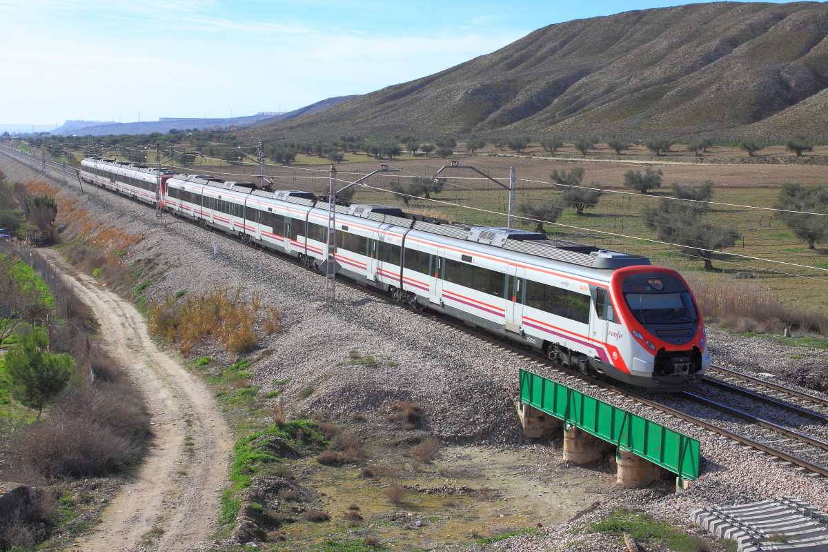 Dos UT S/465 con cercanias de Aranjuez a Madrid-CH. Ciempozuelos.